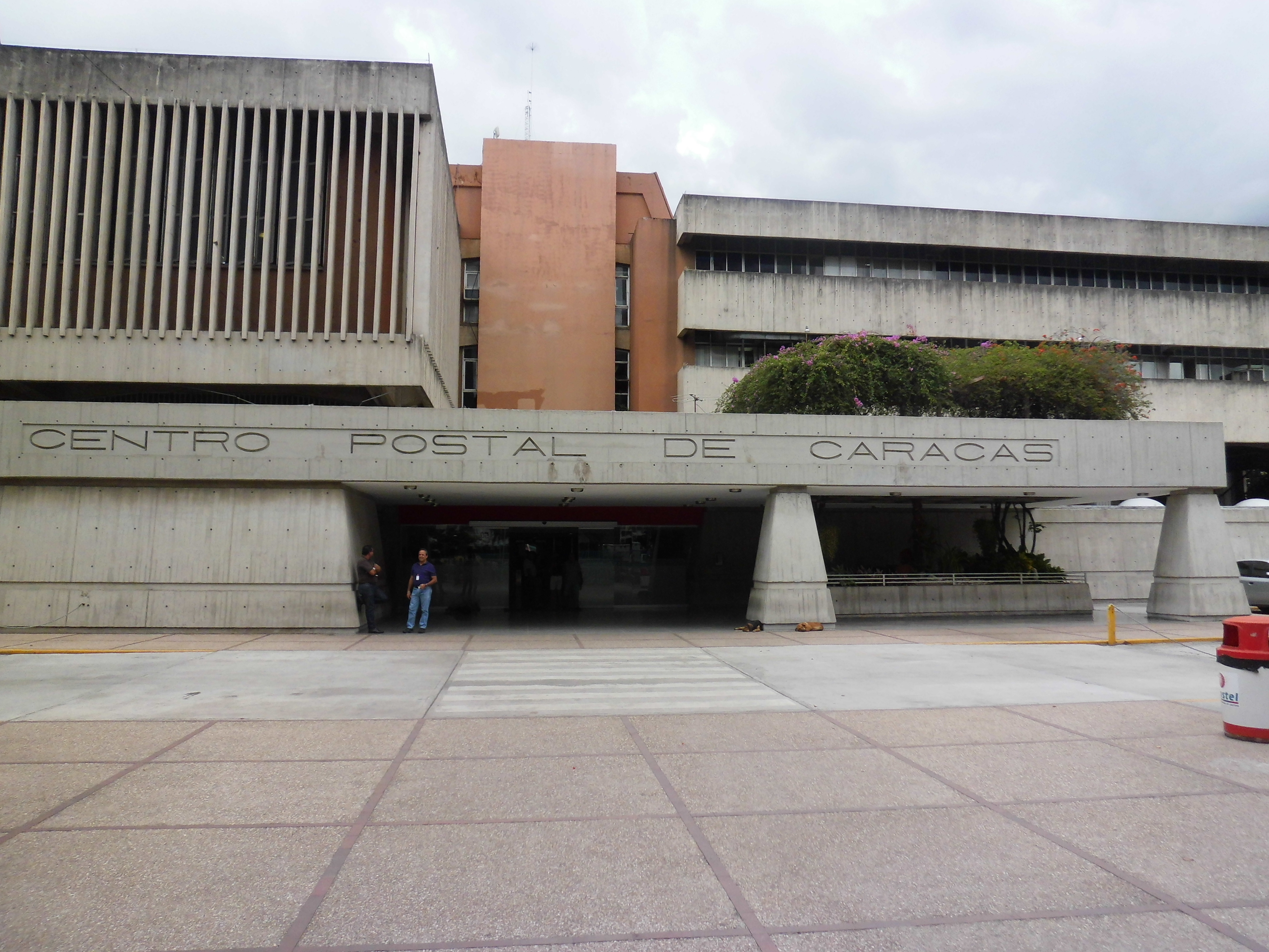 Centro Postal de Caracas avenida José Ángel Lamas, parroquia San Juan, Distrito Capital - Venezuela